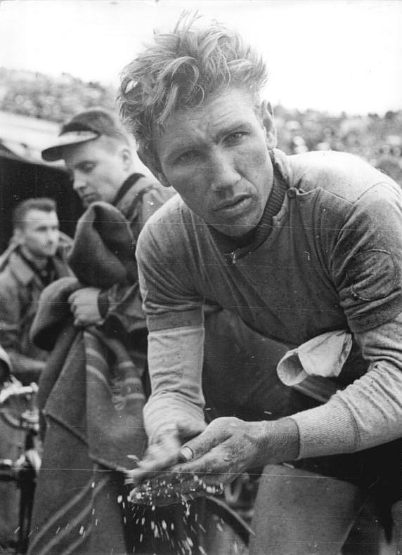 Anatoli Tscherepowitsch Zentralbild Wendorf Hr 10.5.1961 XIV. Internationale Friedensfahrt Warschau-Berlin-Prag 1961. 8. Etappe von Berlin nach Leipzig am 10.5.61. UBz: Antoli Tscherepowitsch (UdSSR erfrischt sich im Stadion. Sein Gesicht ist noch immer von den Anstrengungen gezeichnet.